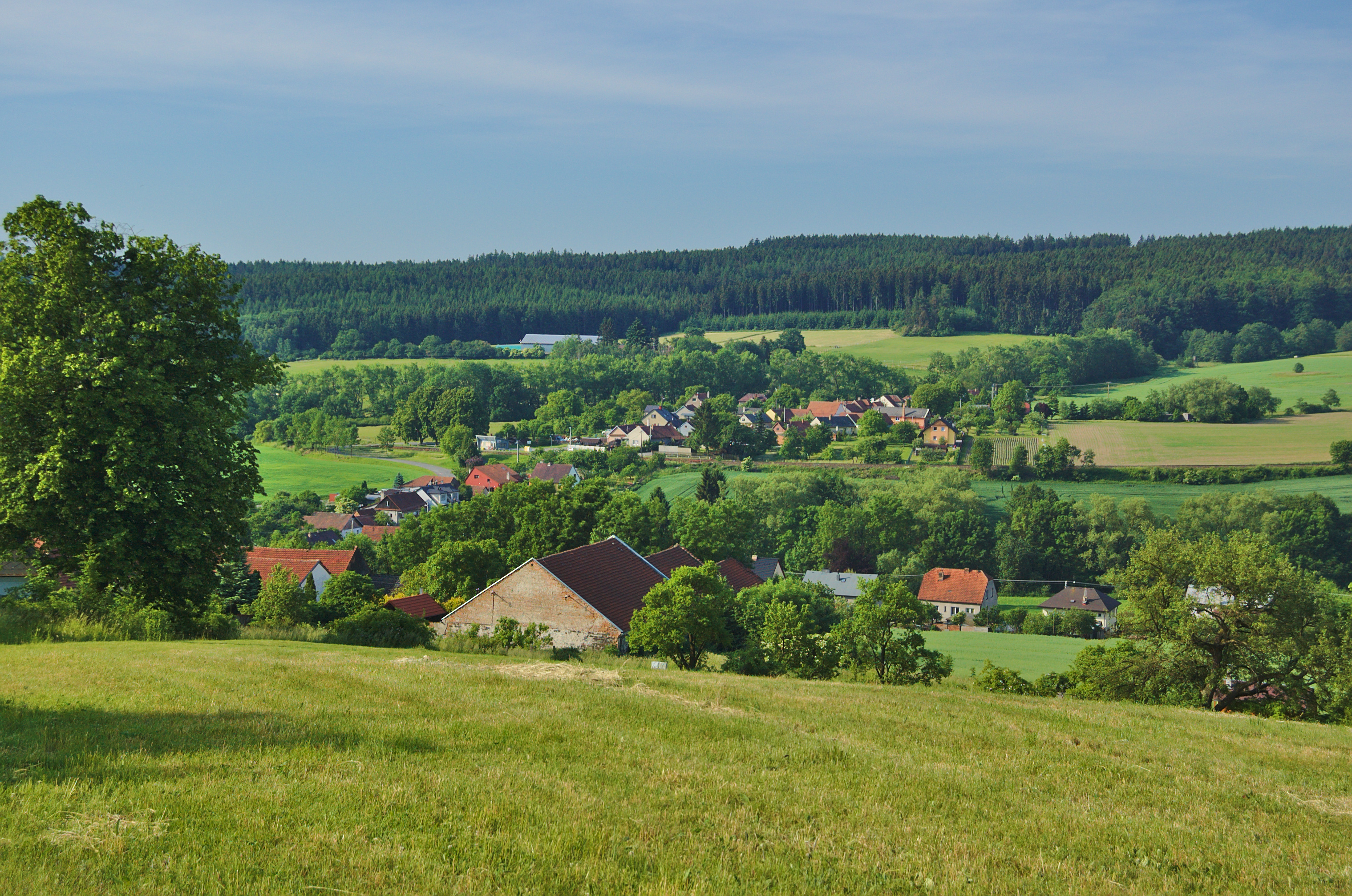 Pohled na obec od severu, Jesenec, okres Prostějov